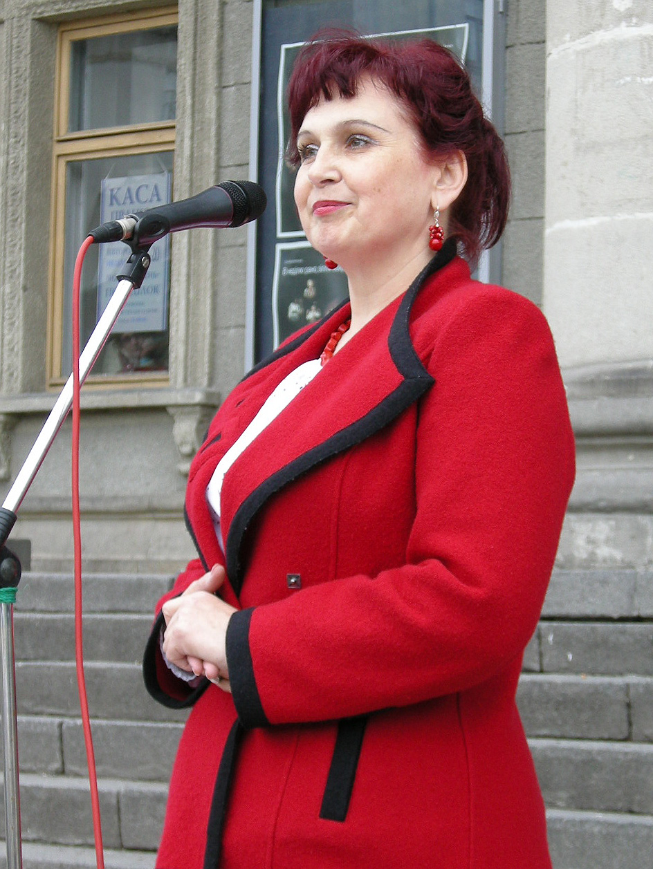 Українська співачка (колоратурне сопрано), народна артистка України, уродженка с. Наконечне Перше Яворівського району Львівської області Наталія Лемішка.